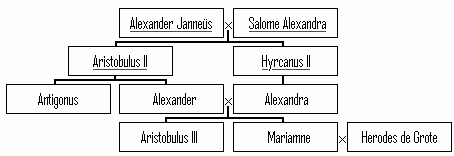 Nadagen van de Hasmoneese dynastie